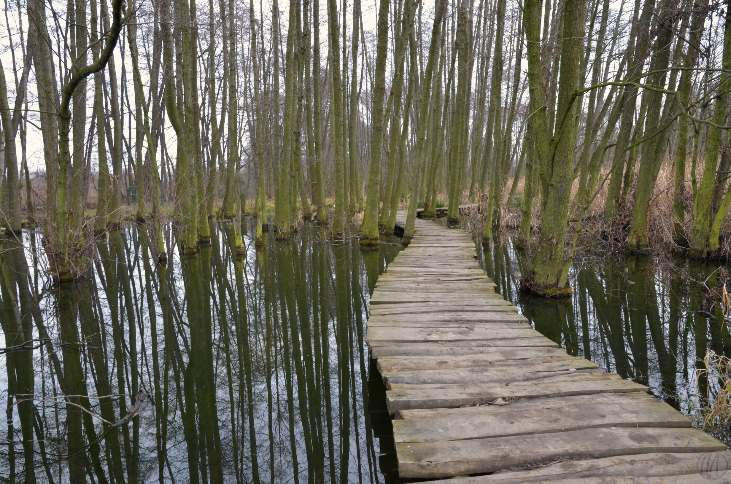 Toulcův dvůr, mokřad